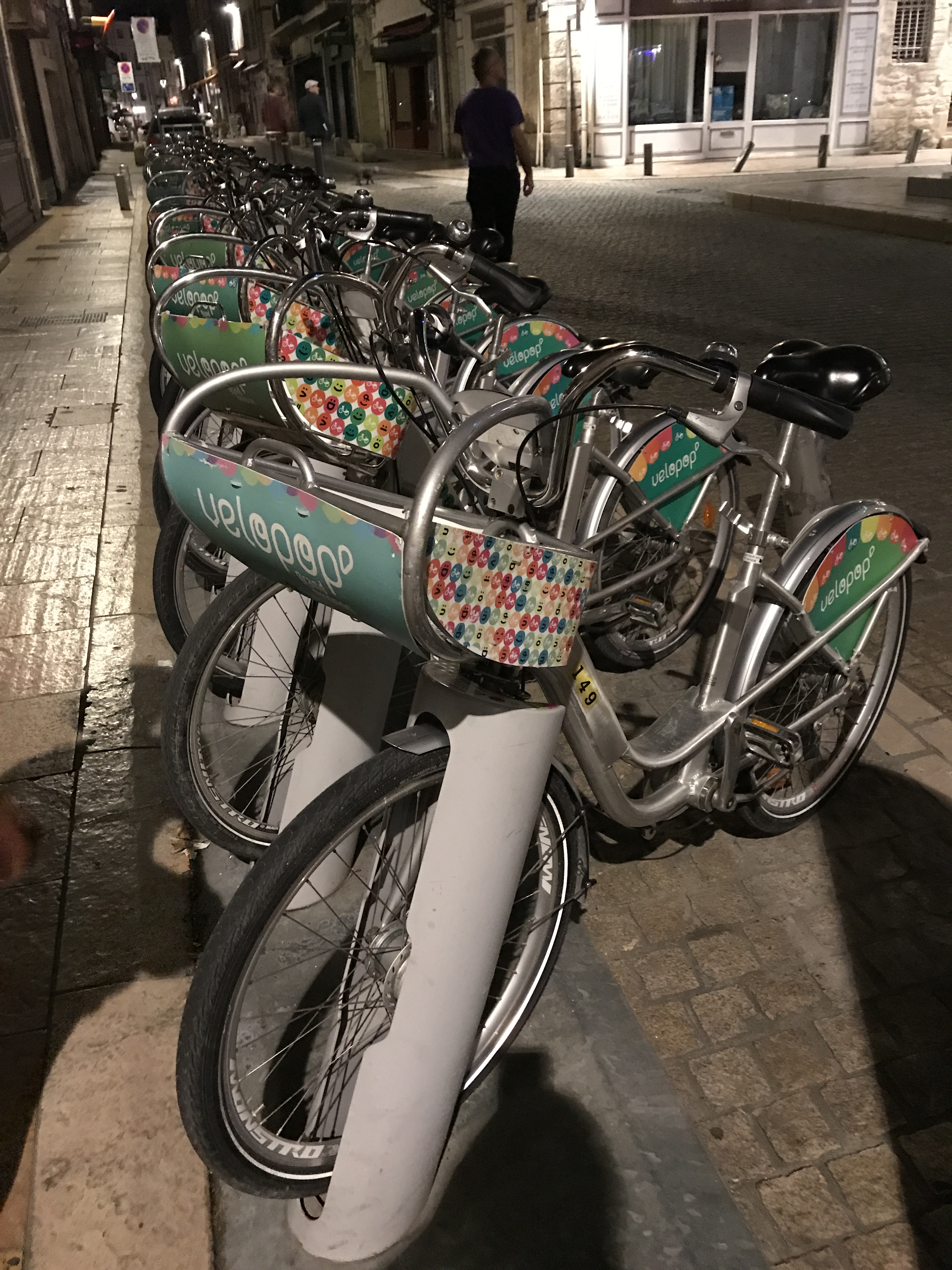 Avignon en juin 2017.